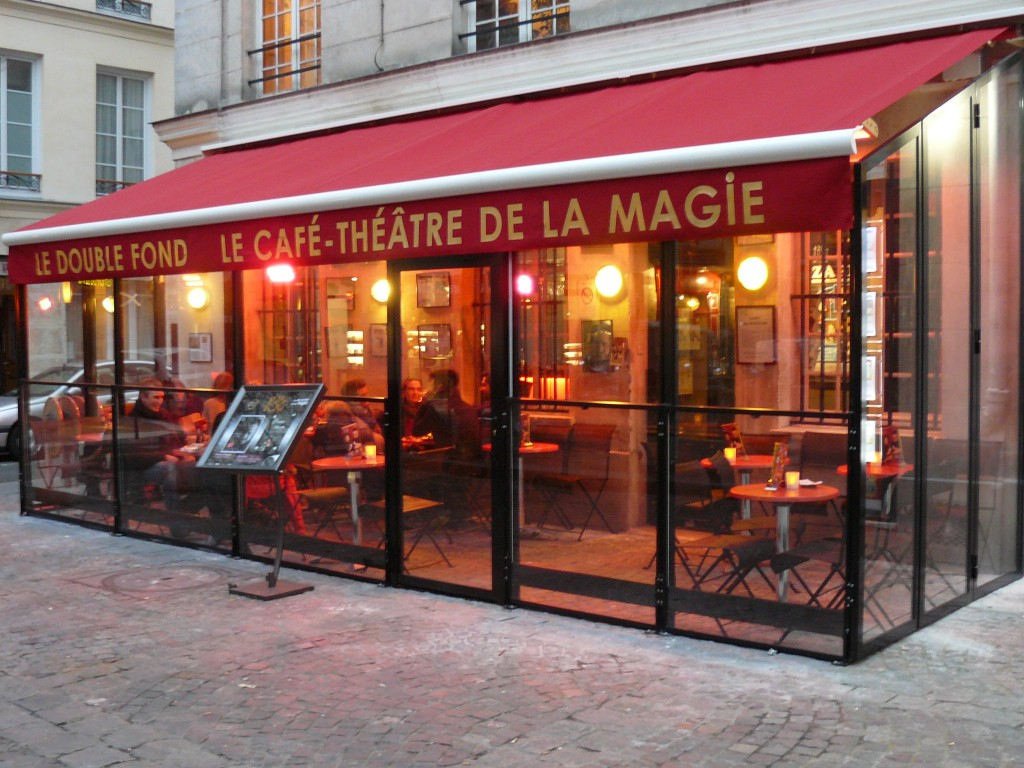 la terrasse du café le double fond